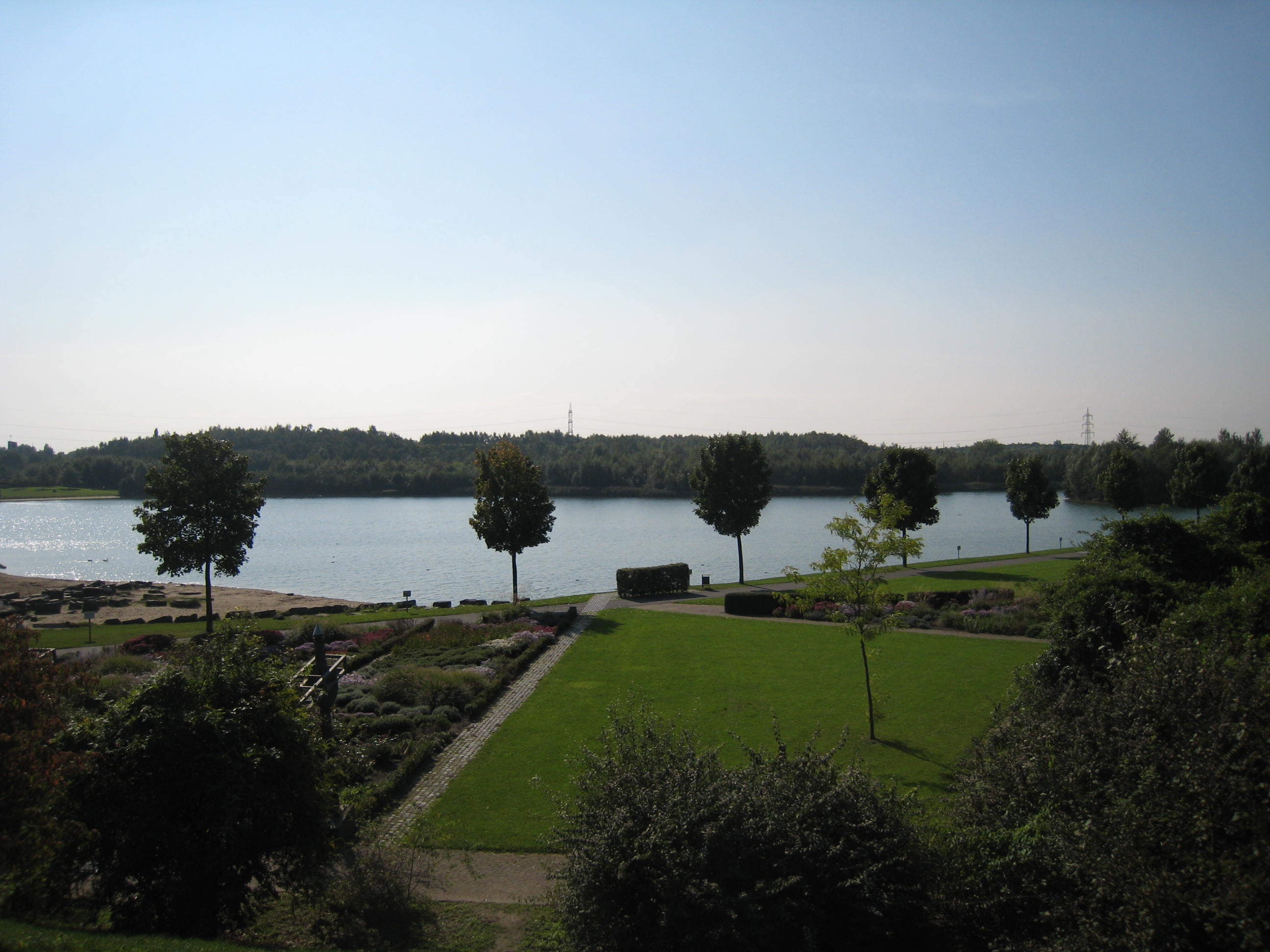 Horstmarer See, Seepark Lünen, Nordrhein-Westfalen